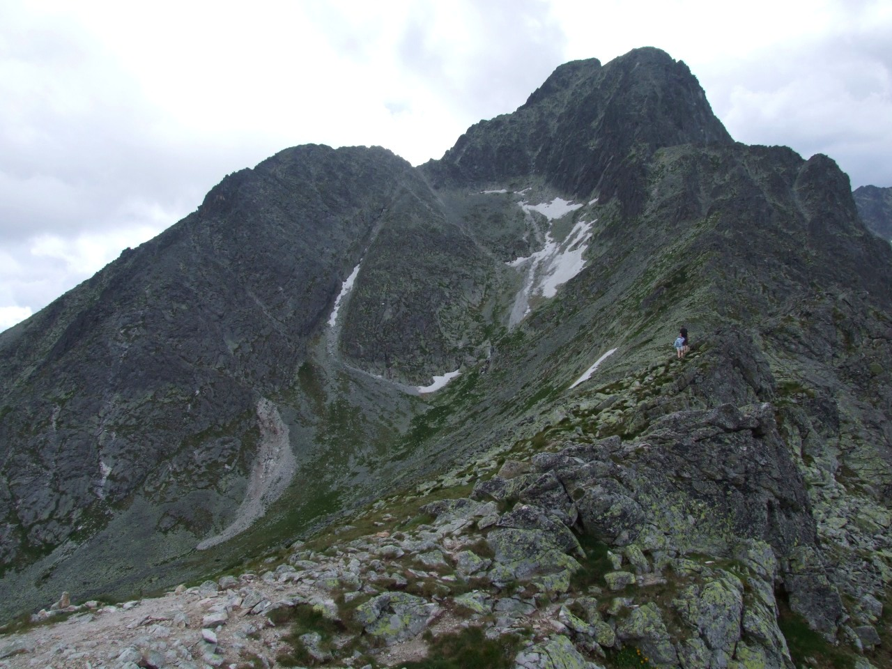 Huncowski Szczyt, Łomnica, Kieżmarski Szczyt, Kieżmarska Kopa i Świstówka Huncowska. Widok z Rakuskiego Przechodu